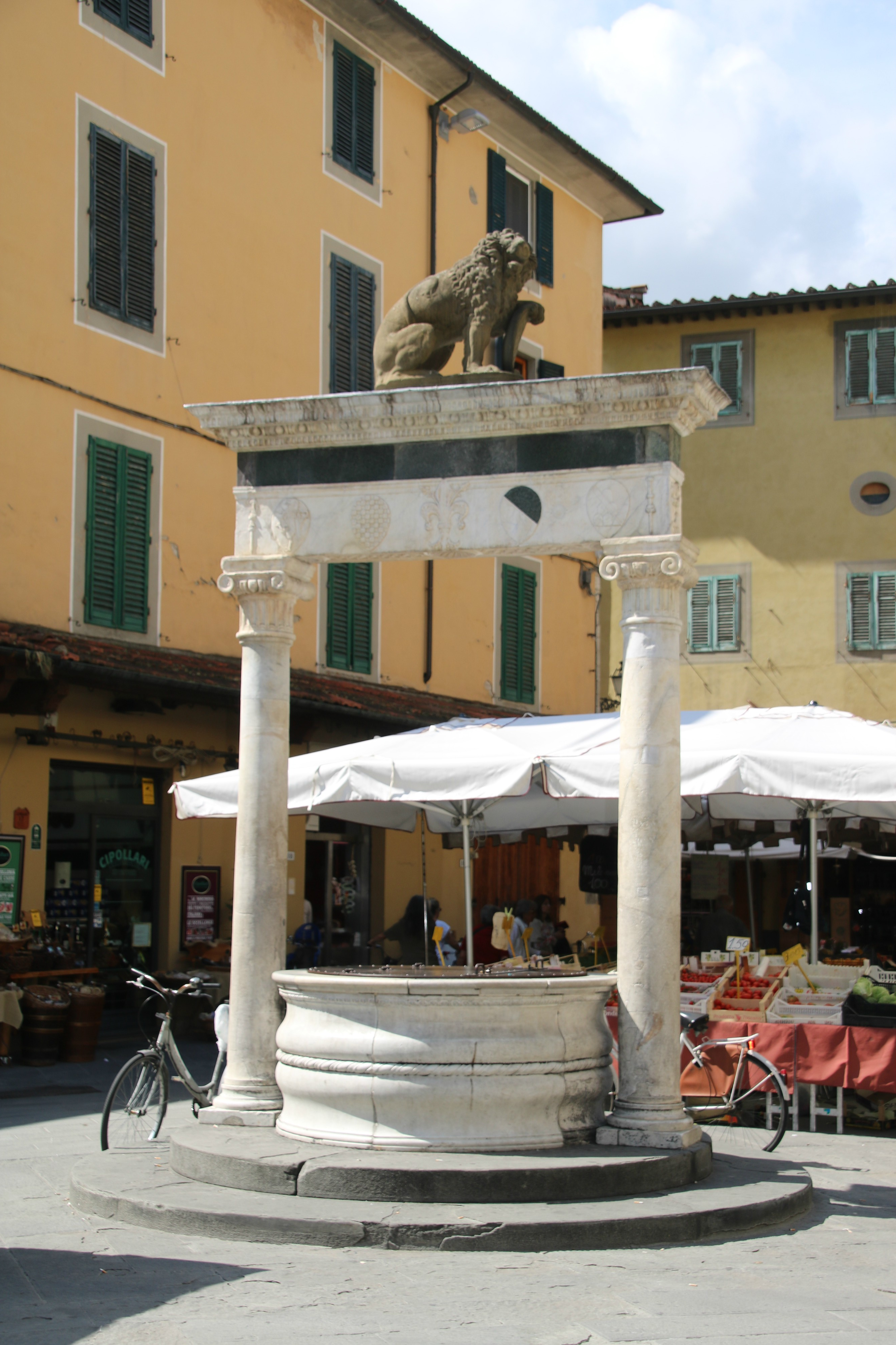 pozzo del Leoncino This is a photo of a monument which is part of cultural heritage of Italy.